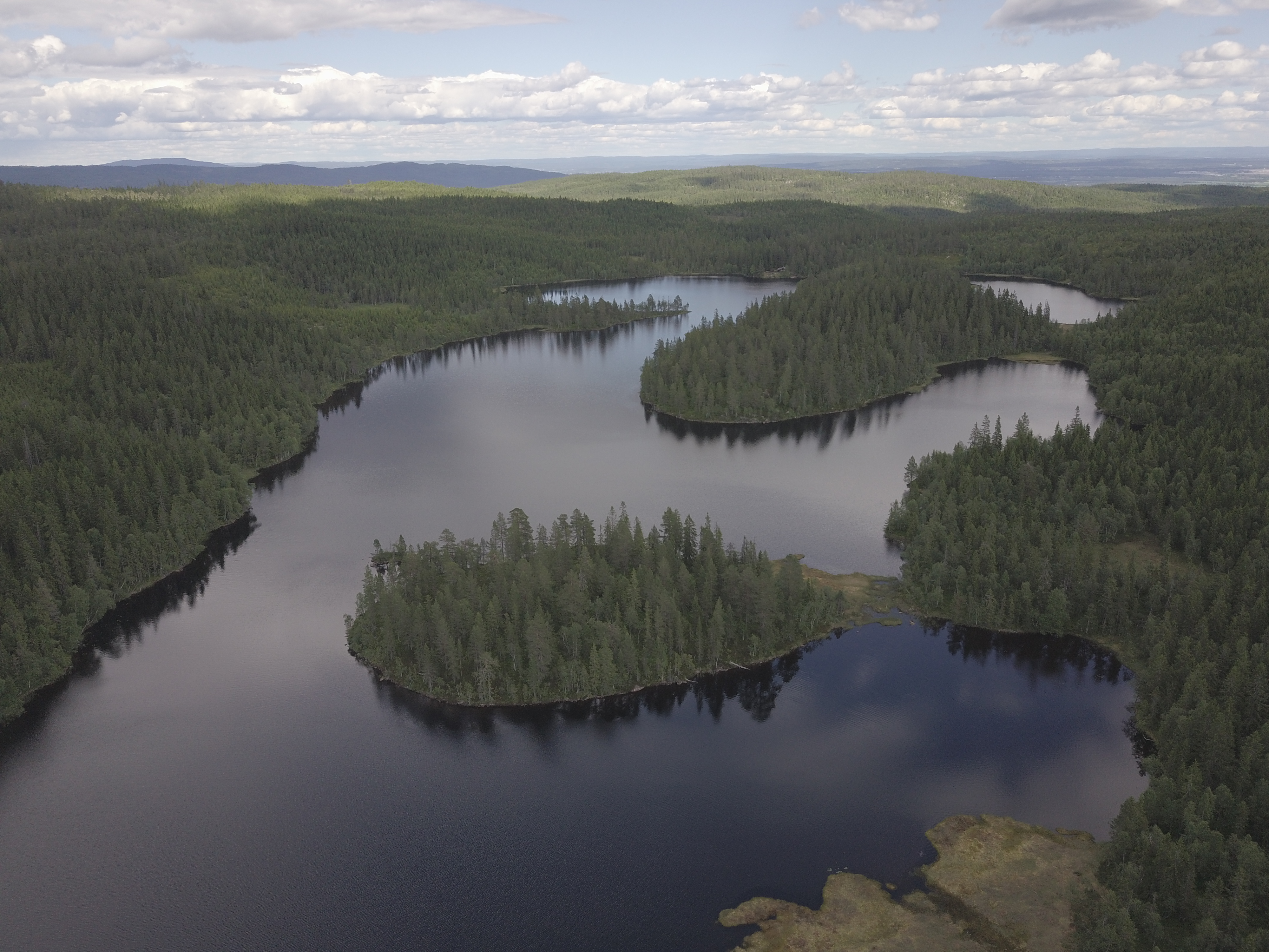 Råbjørn i Romeriksåsen